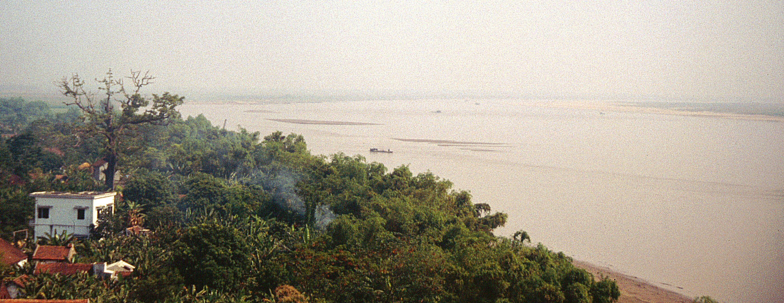 Roter Fluss